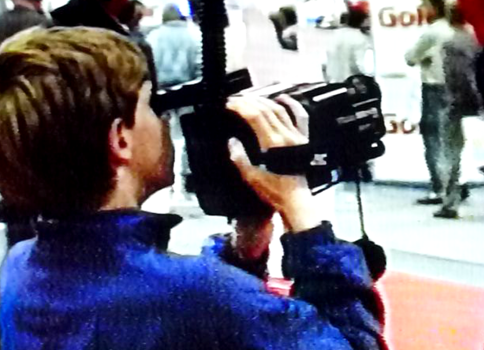 Vision 86 på Stockholmsmässan (skärmfoto från egen video)